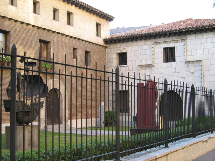 Valladolid – España (Spain) - Casa Museo de Colón: Edificio inaugurado en 1968 y construido por el Ayuntamiento de Valladolid, como homenaje a Cristóbal Colón, fallecido en Valladolid el 20 de mayo de 1506.